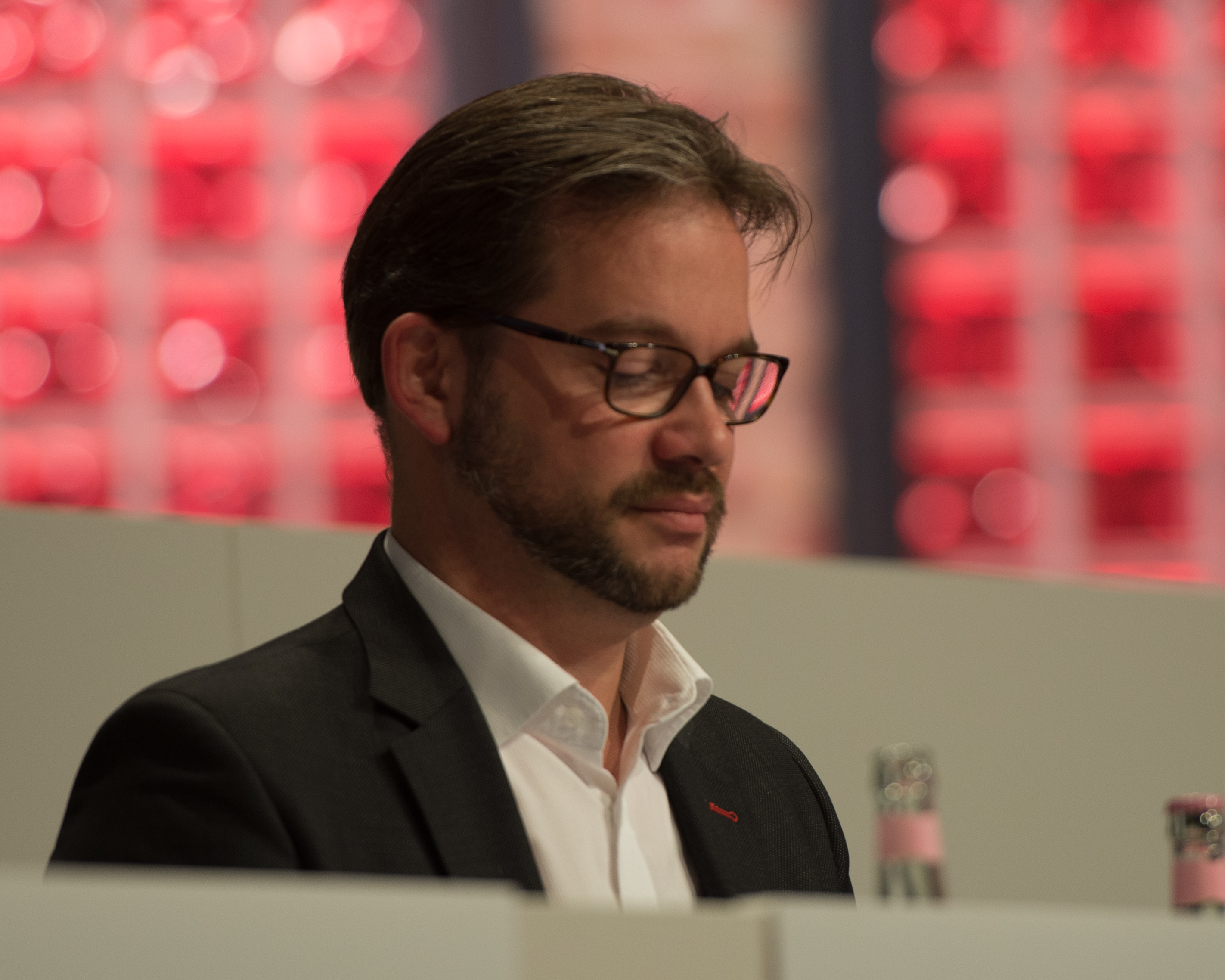 Florian Pronold auf dem SPD Bundesparteitag am 19. März 2017 in Berlin